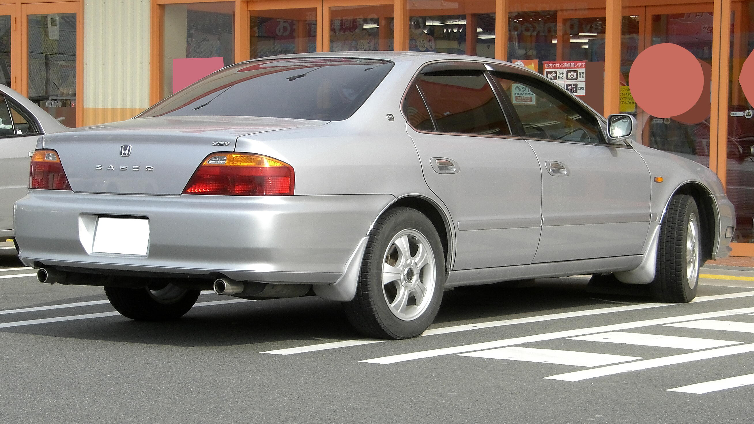 ホンダ・セイバー（2代目）